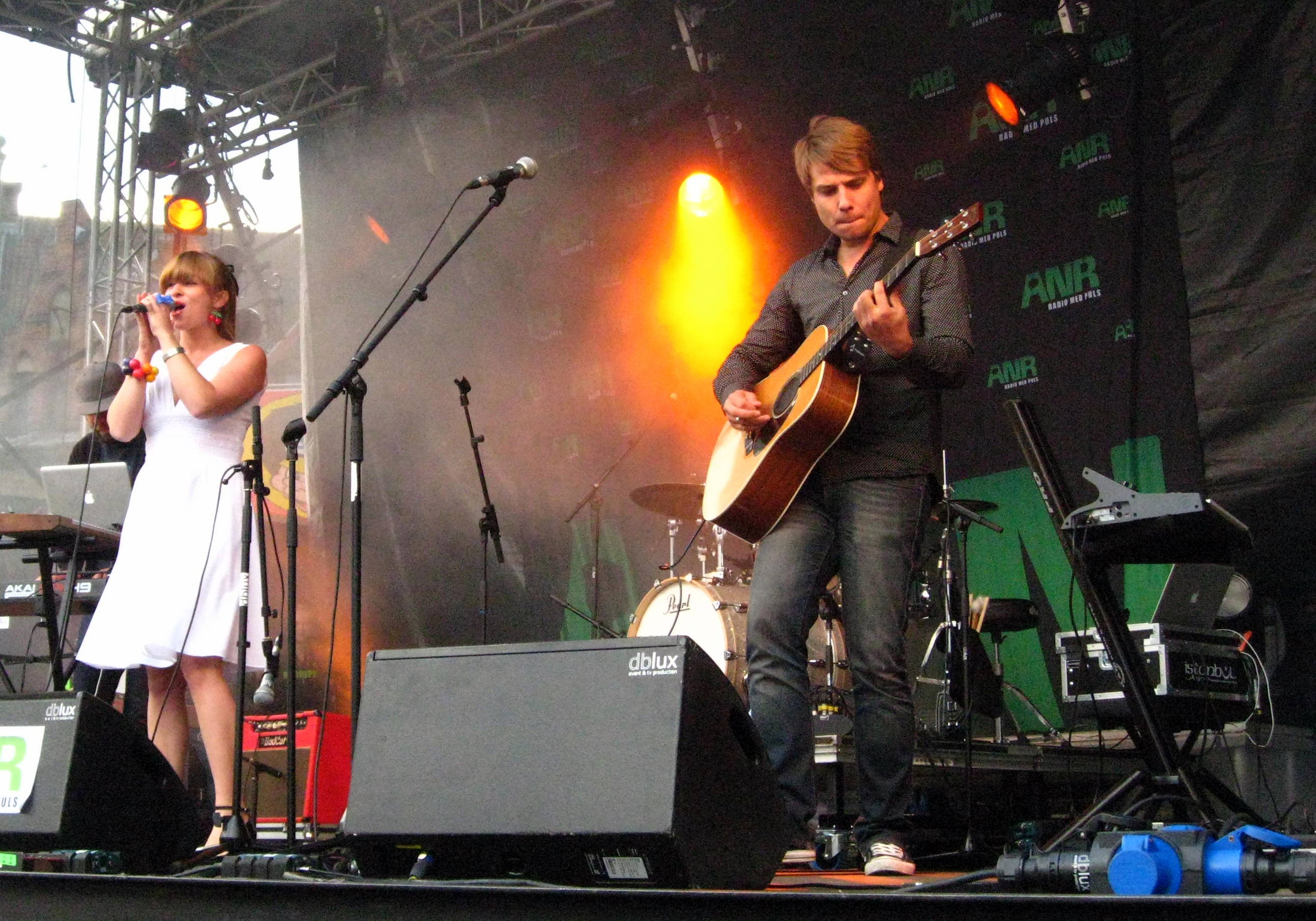 Louise Dubiel i Hjørring, 2010